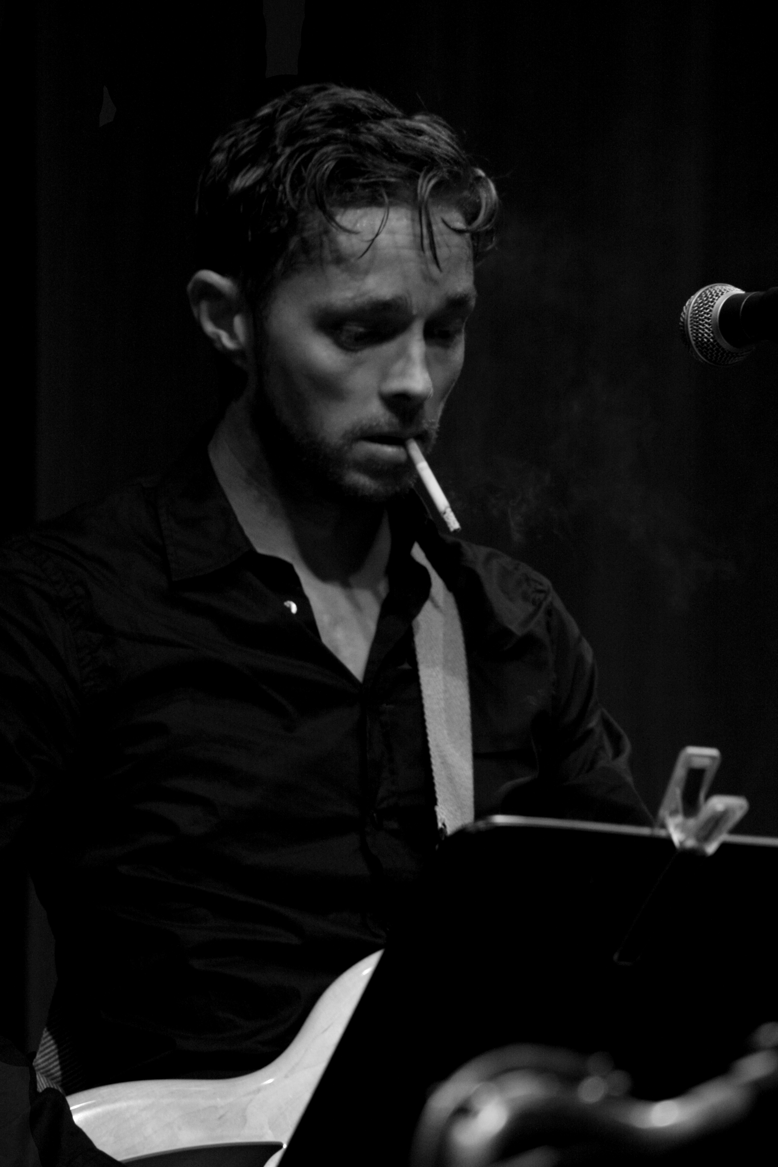 Daniel Gilbert under spelning med Augustifamiljen 27 augusti 2009.